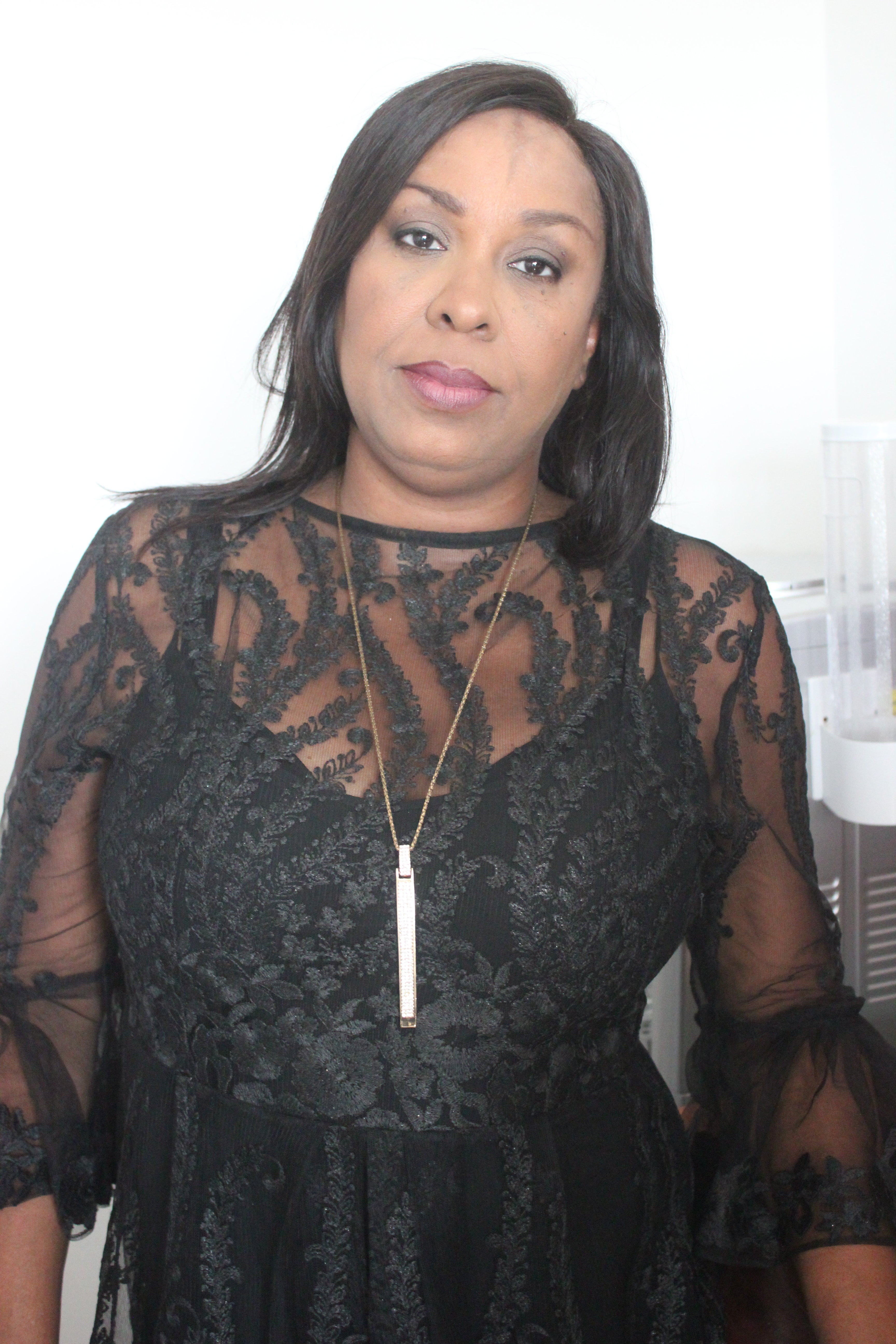 Innauguration